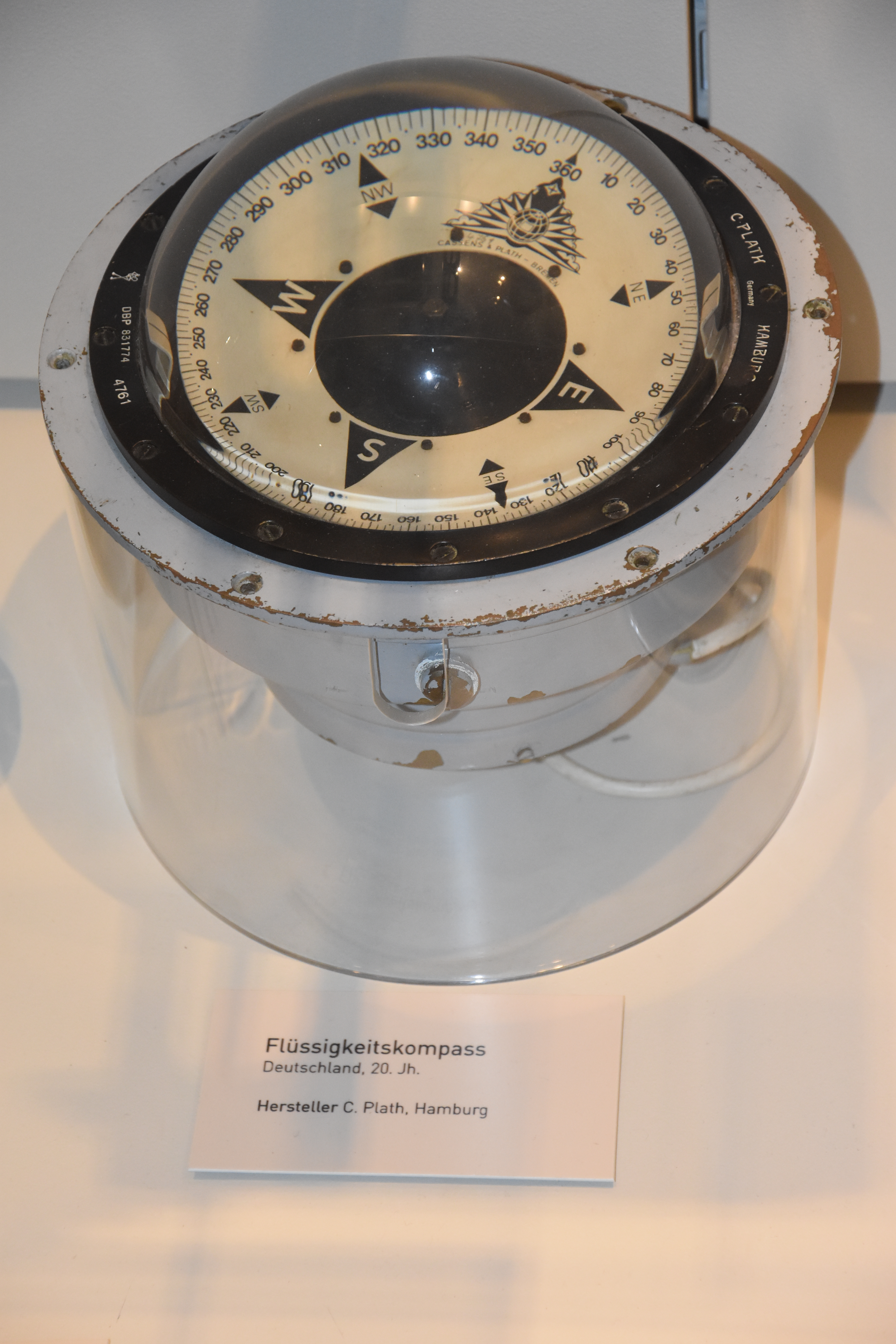 Flüssigkeitskompass aus einem Schiff, ausgestellt im Maritimen Museum Hamburg. Hersteller C. Plath (vormals ein Teil der Plath GmbH)